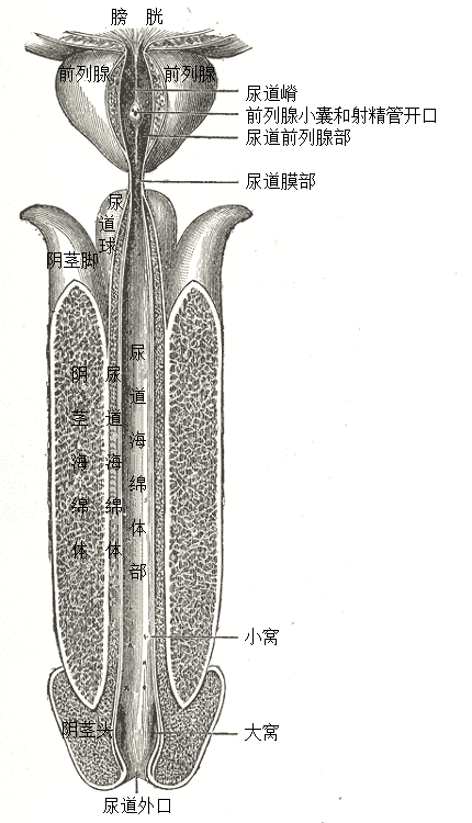 男性尿道纵剖图。